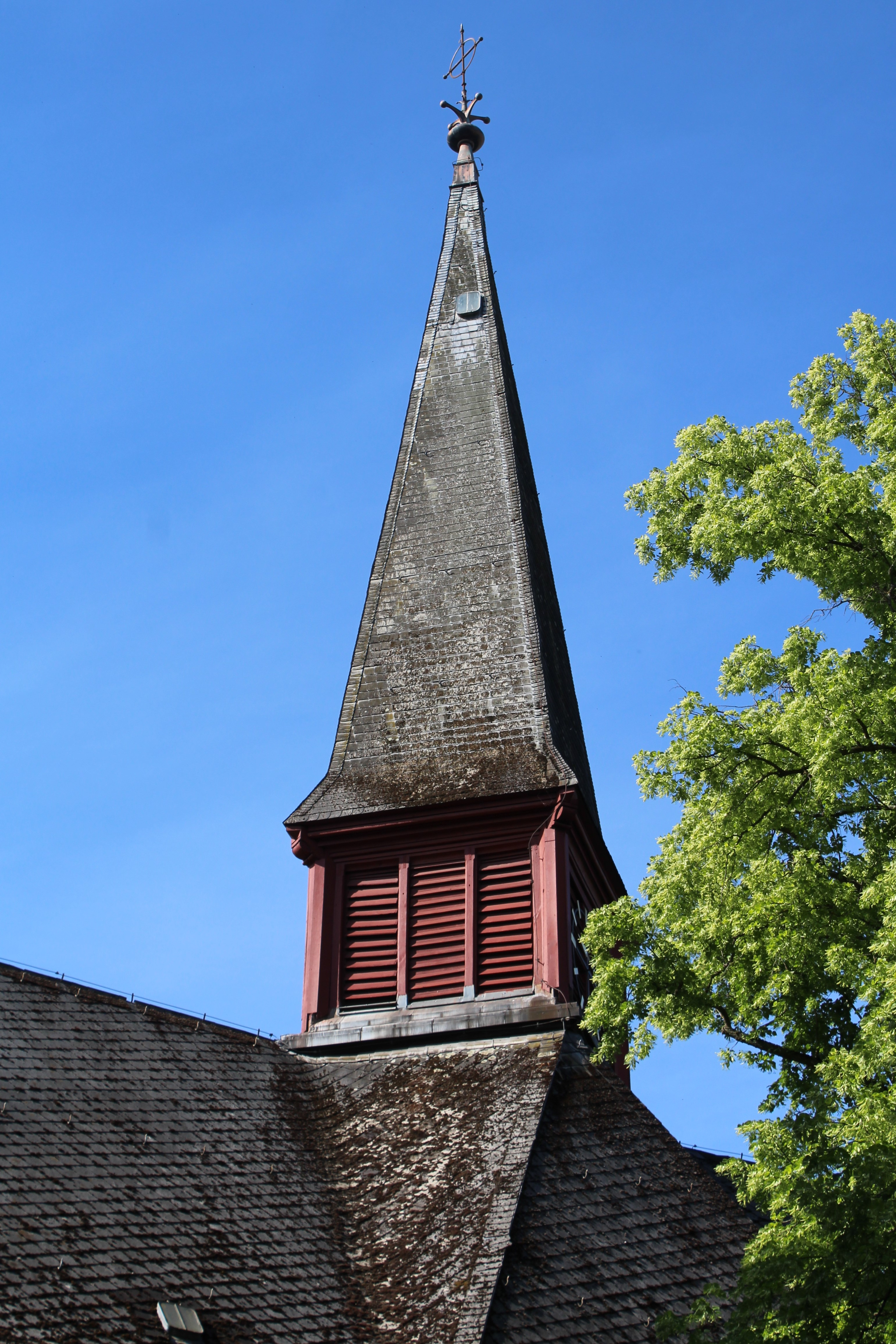 Evangelische Kirche Burgsolms, Solms, Lahn-Dill-Kreis, Hessen, Deutschland